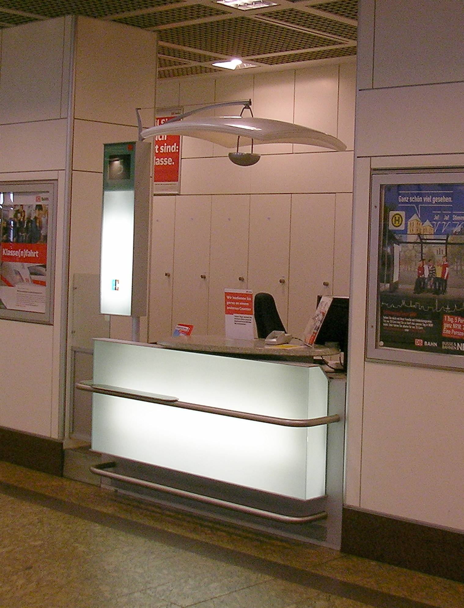 Fahrkartenschalter im Bahnhof